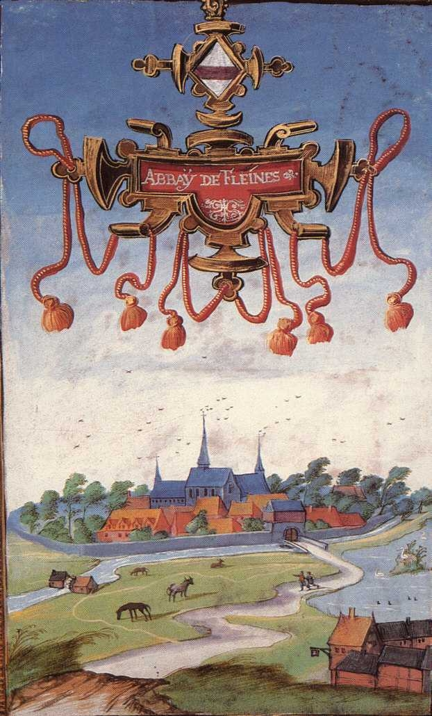 Cartulaire Abbaye de Flines lez Rraches